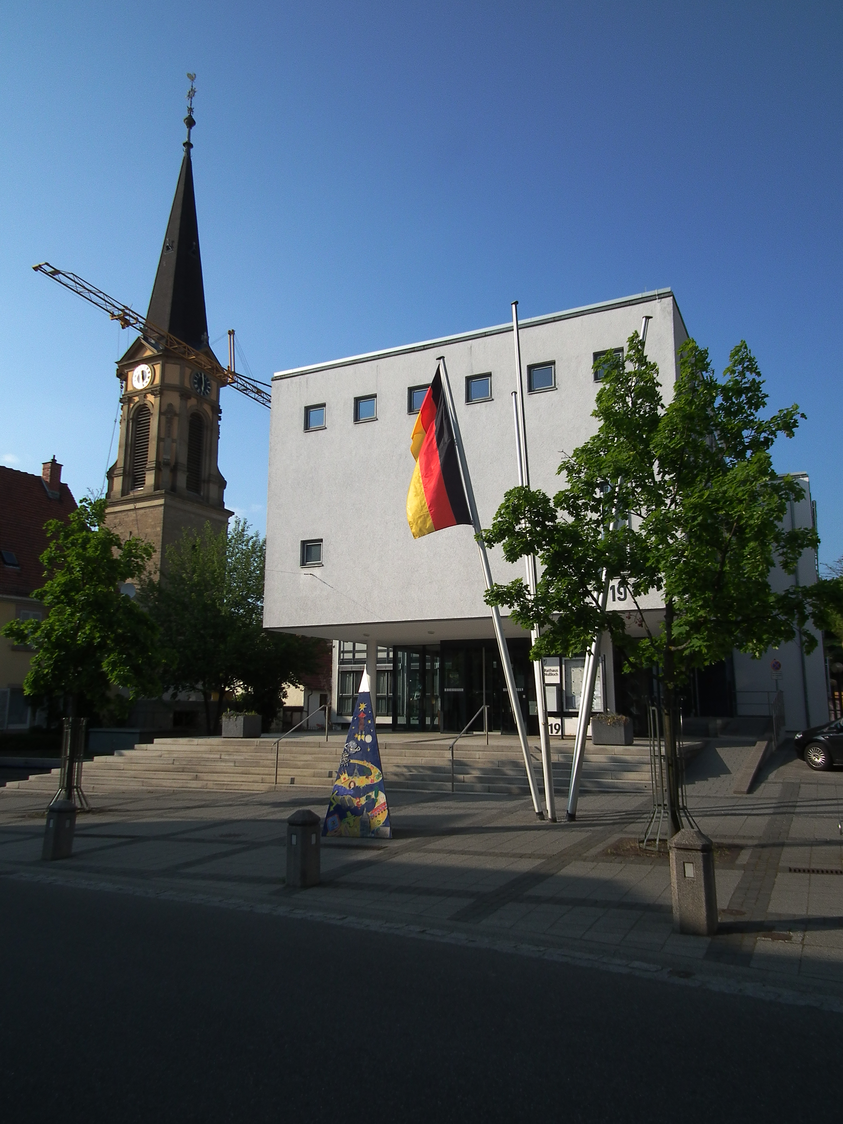 Turm der evangelischen Kirche, daneben das Rathaus in Nußloch (Baden-Württemberg, Deutschland)